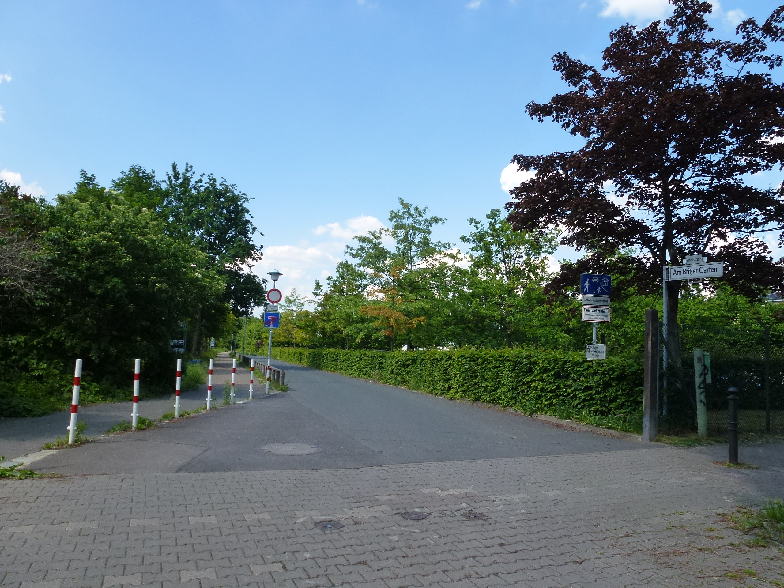 Berlin-Britz Am Britzer Garten